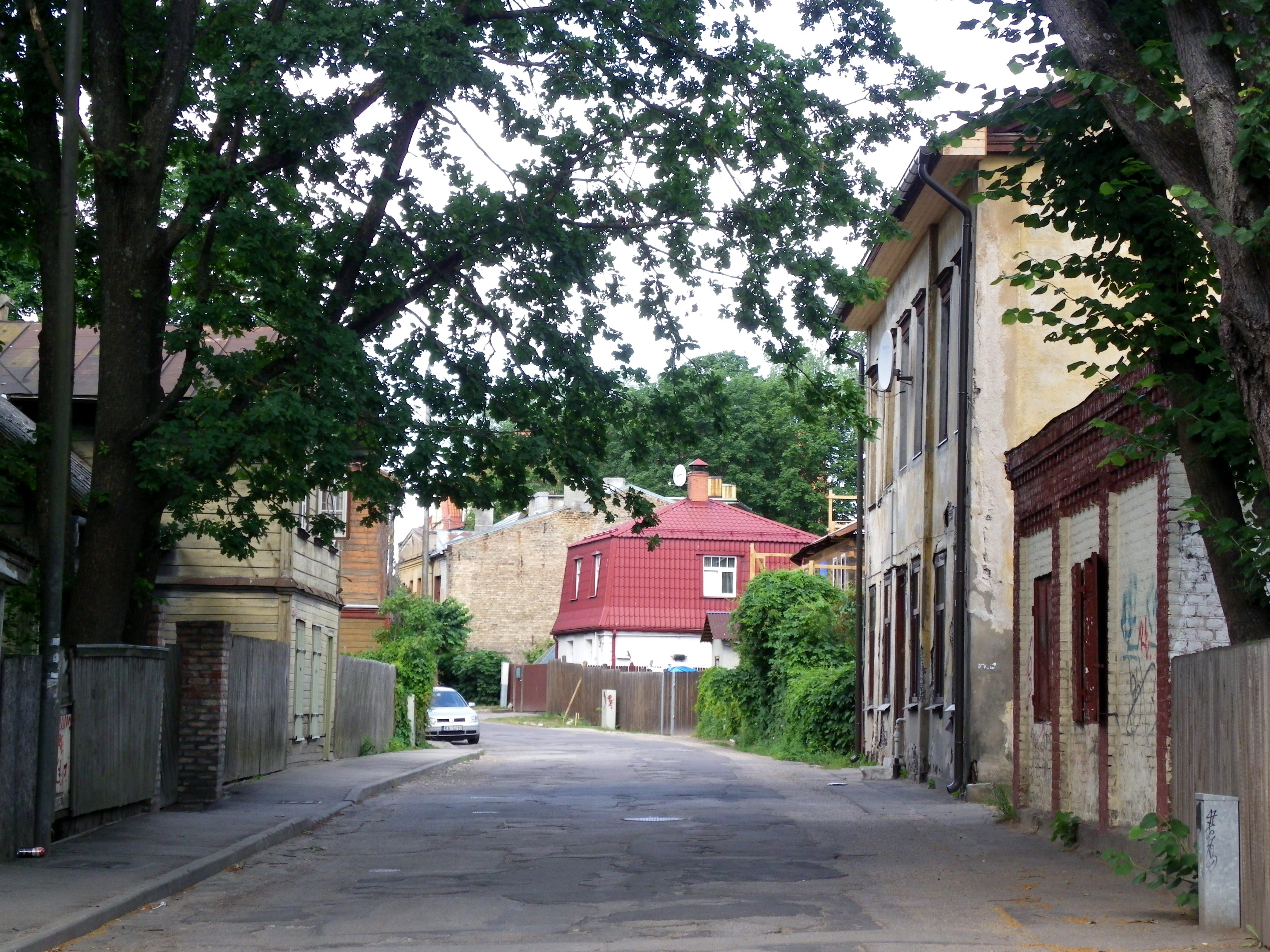 Lapu iela, skats no sākuma (no Amalijas ielas)